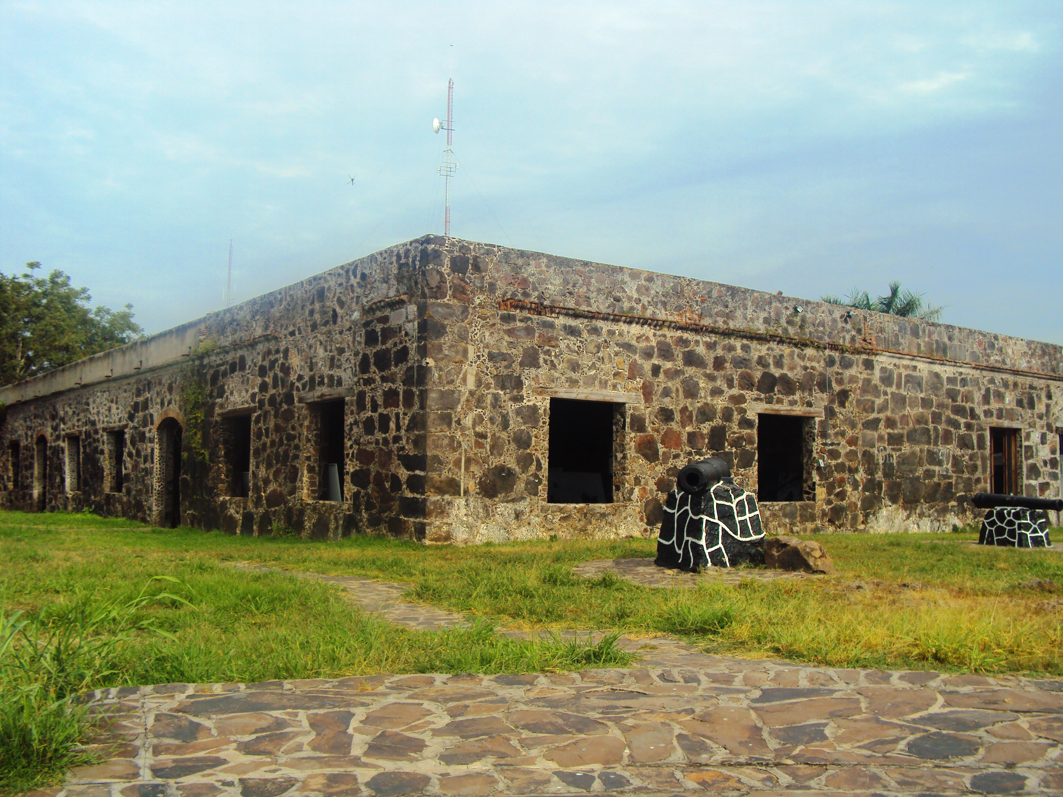 La Contaduría